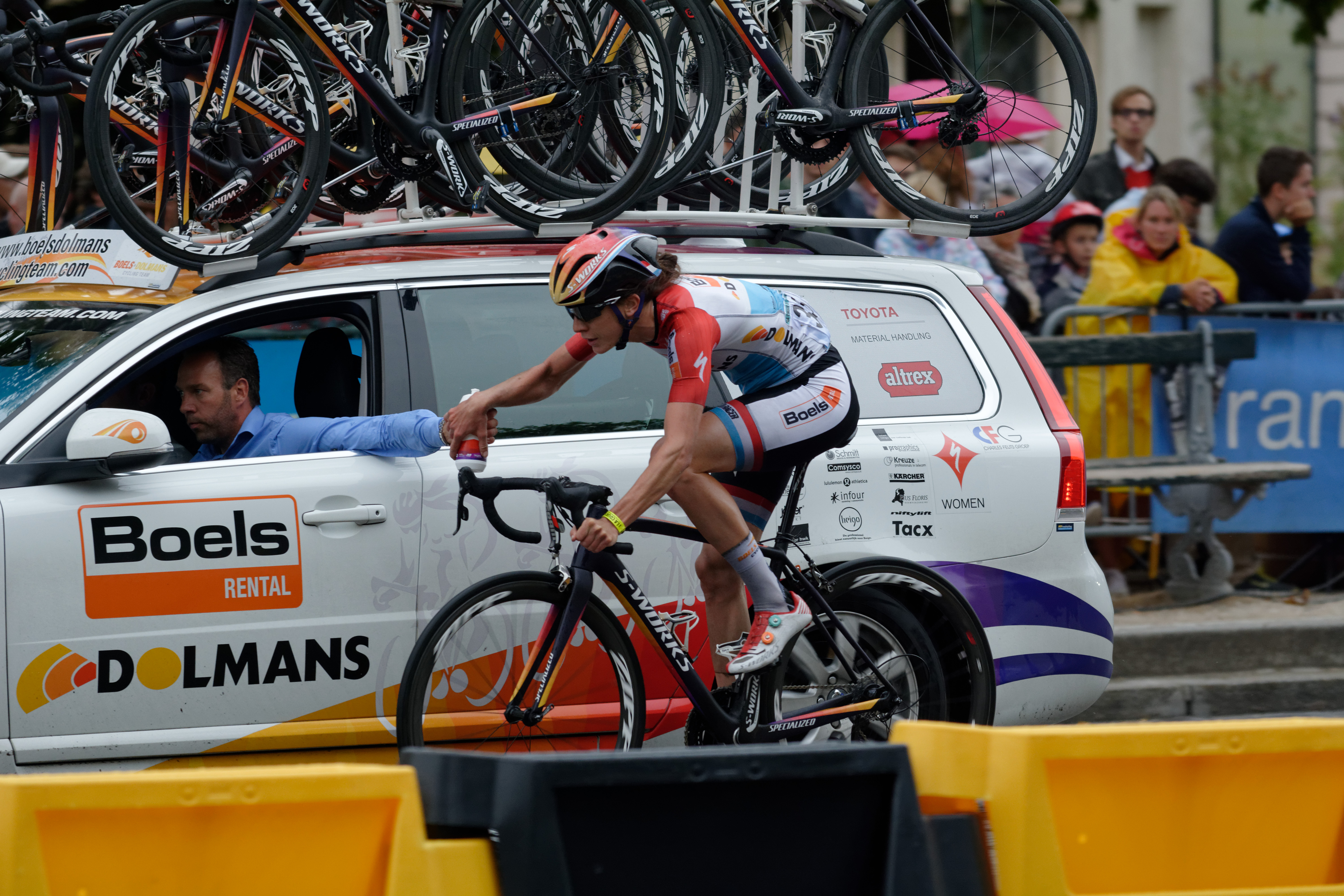 D71_2175_DxO